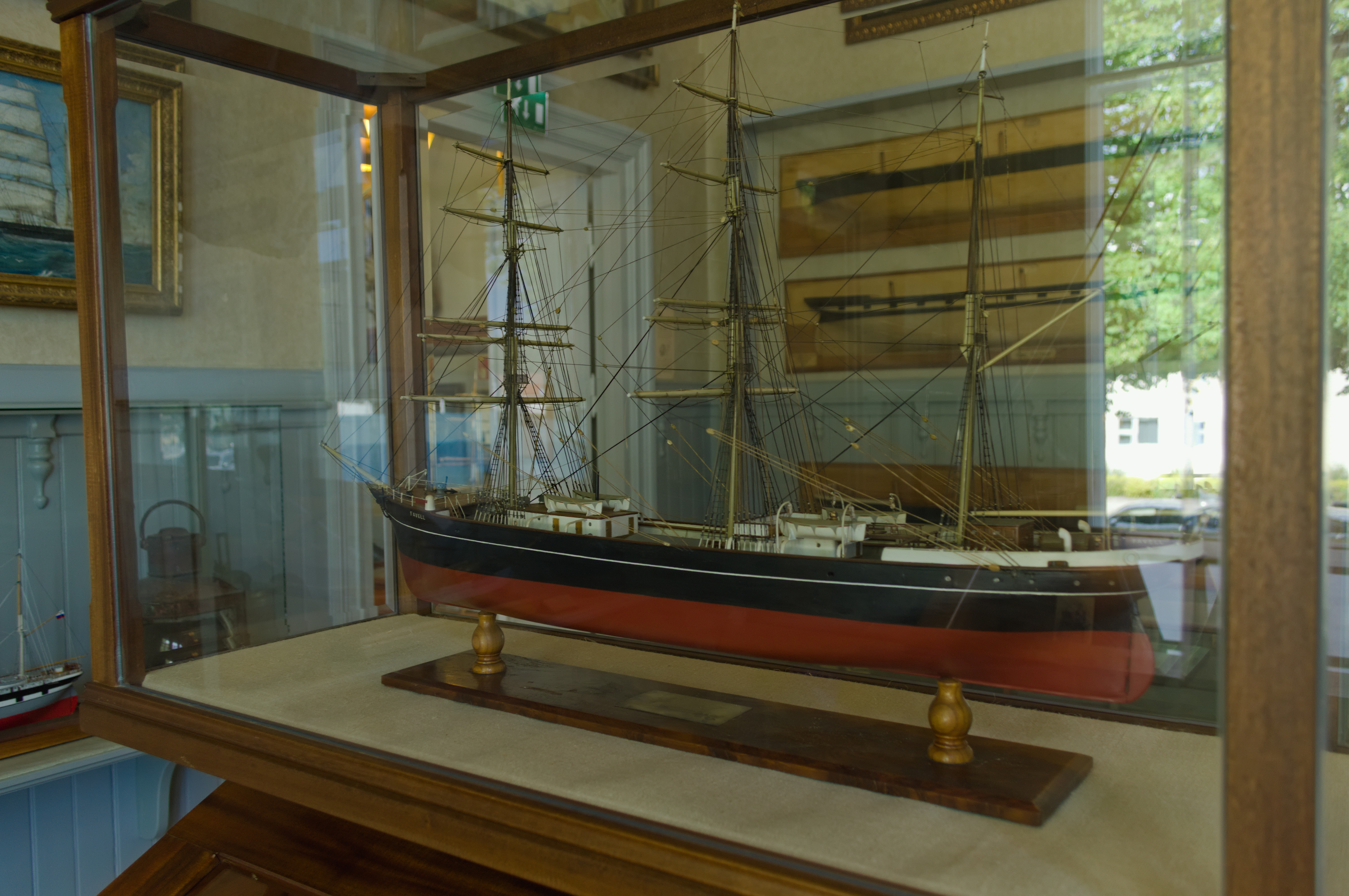 Parkki Favellin pienoismalli Rauman merimuseossa